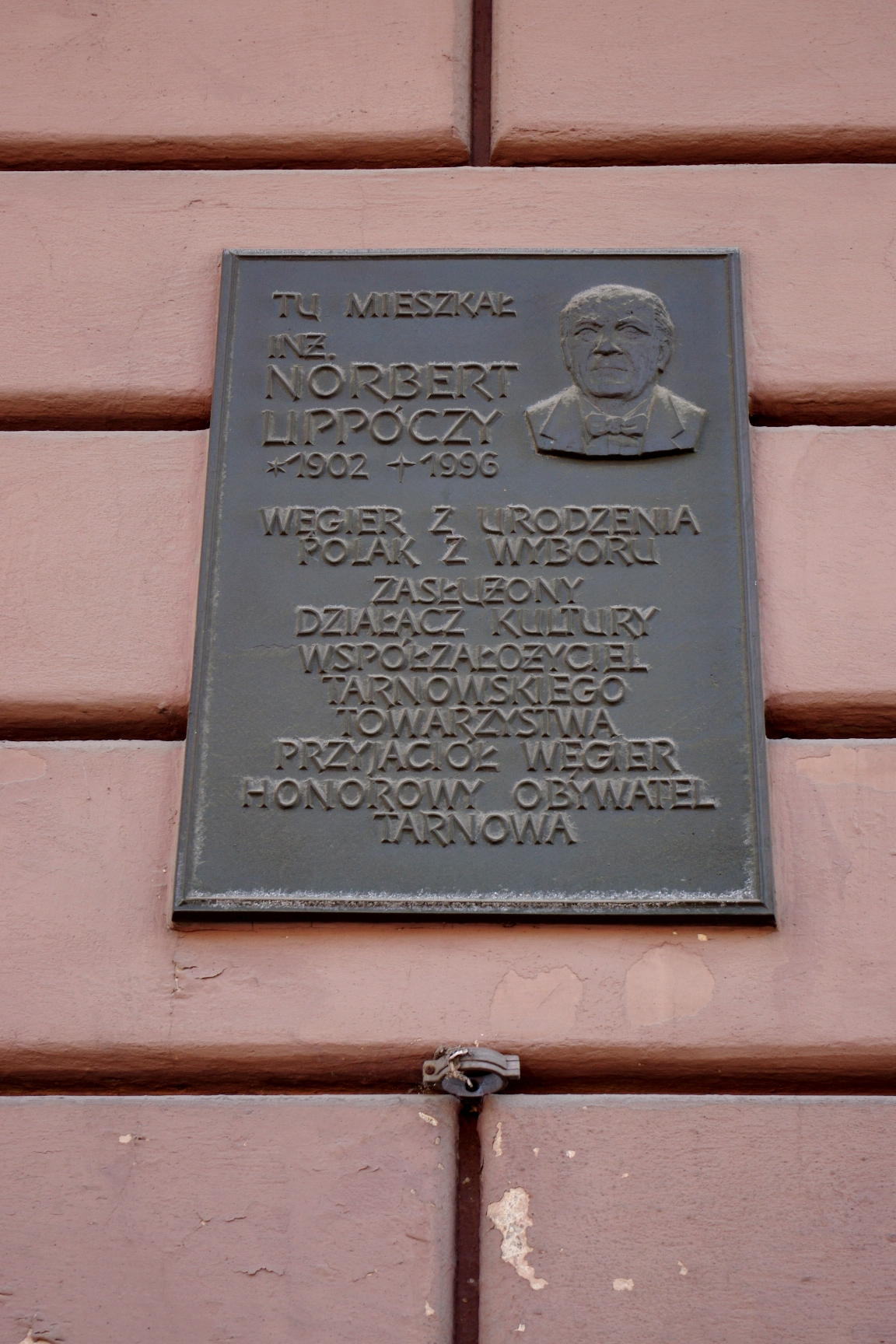 Tablica upamiętniająca Norberta Lippóczego (1902-1996) - współzałożyciela i wieloletniego działacza Tarnowskiego Towarzystwa Przyjaciół Węgier, na ul Mickiewicza w Tarnowie